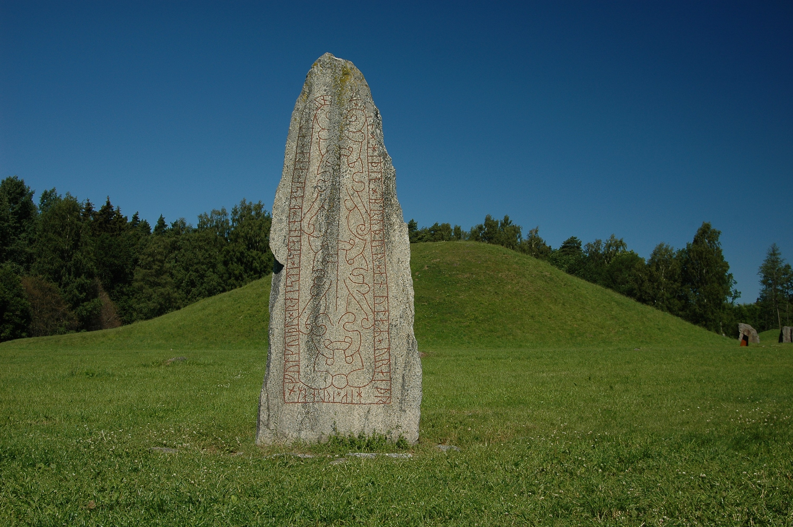 Anundshög, Västerås